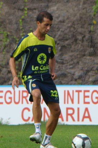 David González entrenando.